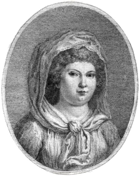 Portrait der Schriftstellerin Christiane Sophie Ludwig (1764-1815)